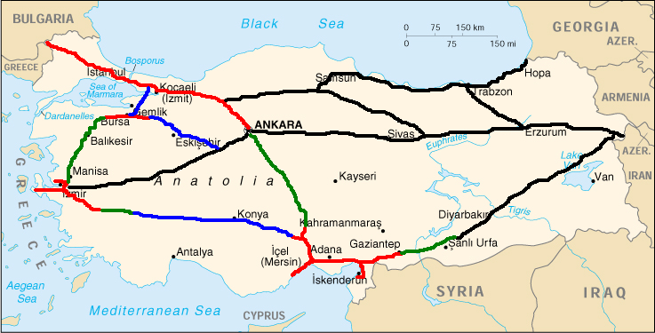 Autobahn, Türkei